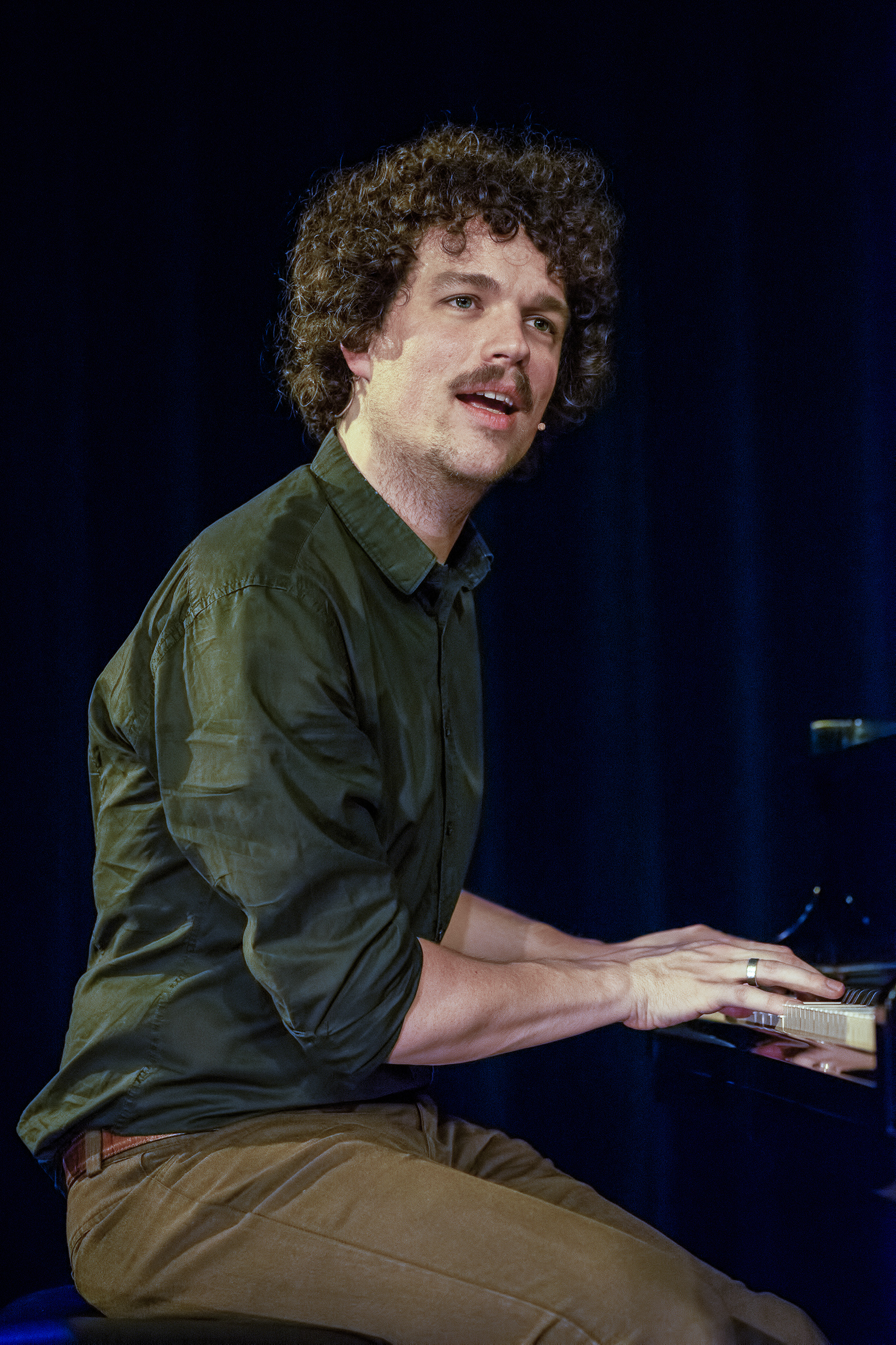 Senne Guns in The Preacher in Geraardsbergen in 2020